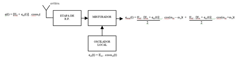 misturador , oscilador local , etapa R.F. , f0 - fol